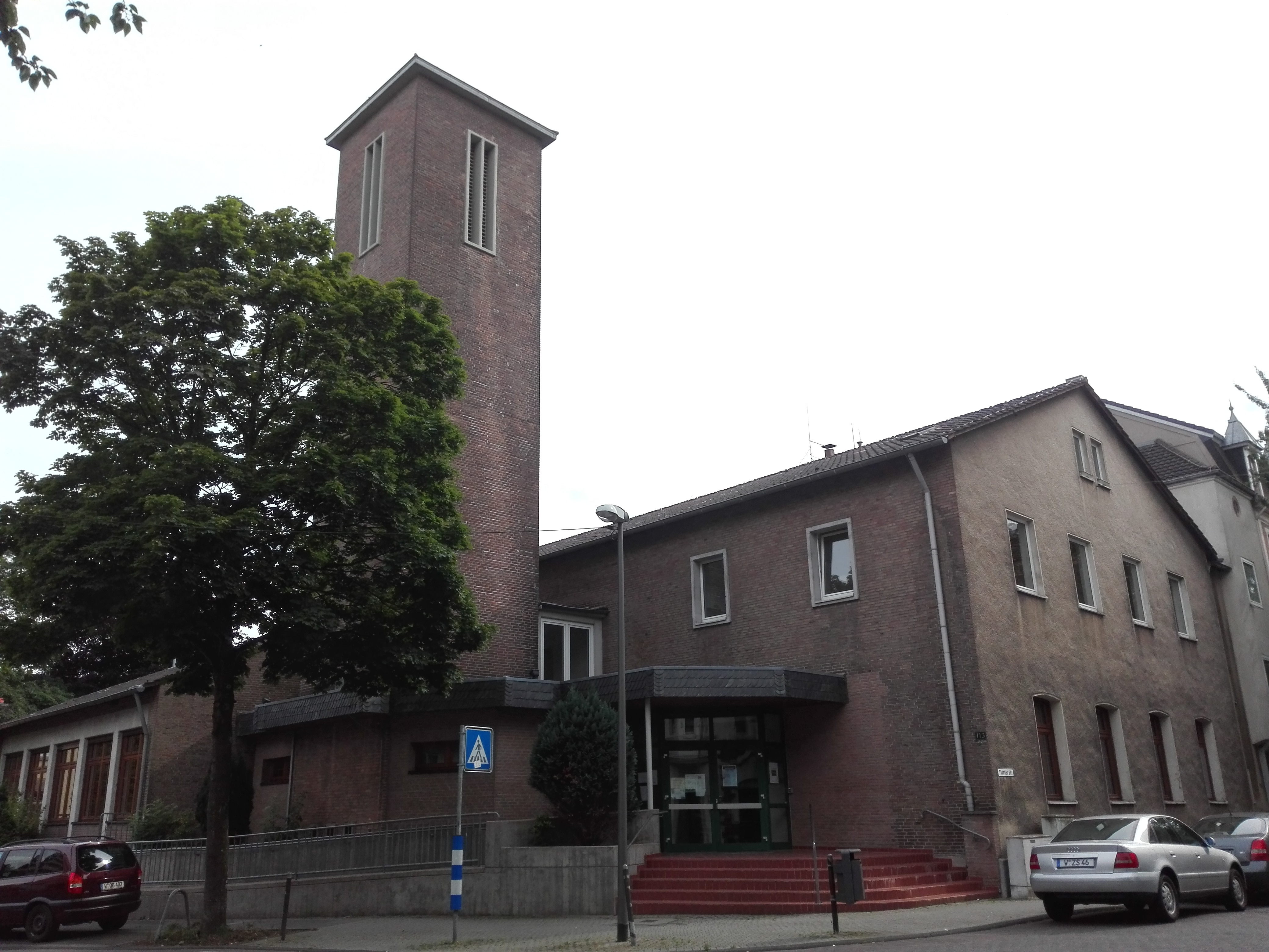 Ansichten der Rotter Kirche in Wuppertal-Unterbarmen